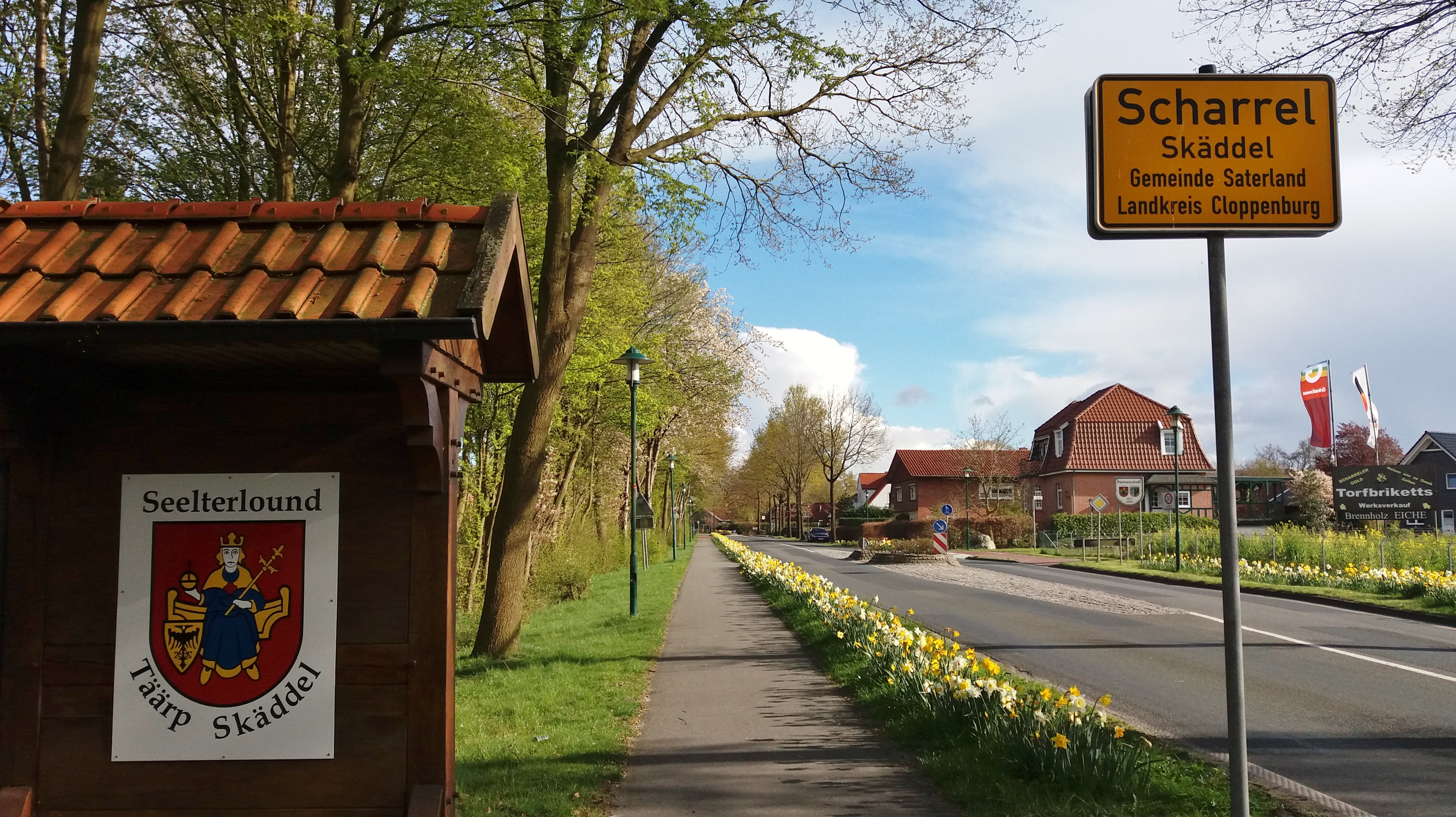 Seeltersk: Täärpskild Skäddel an ju Noudsiede fon dät Täärp.